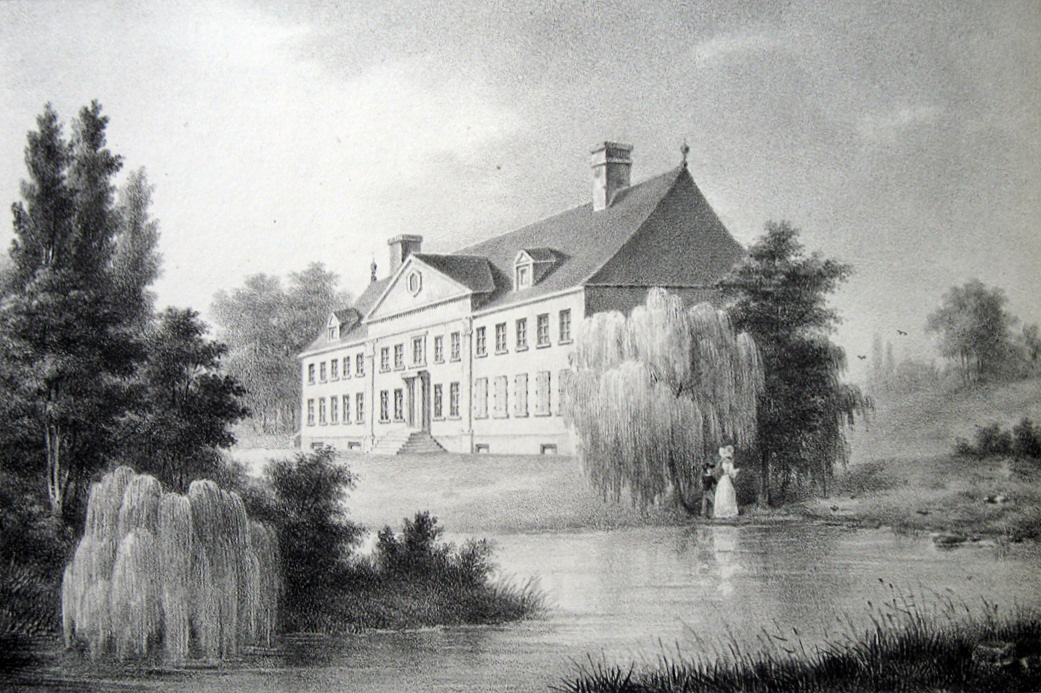 Schloss Hovorst in Viersel